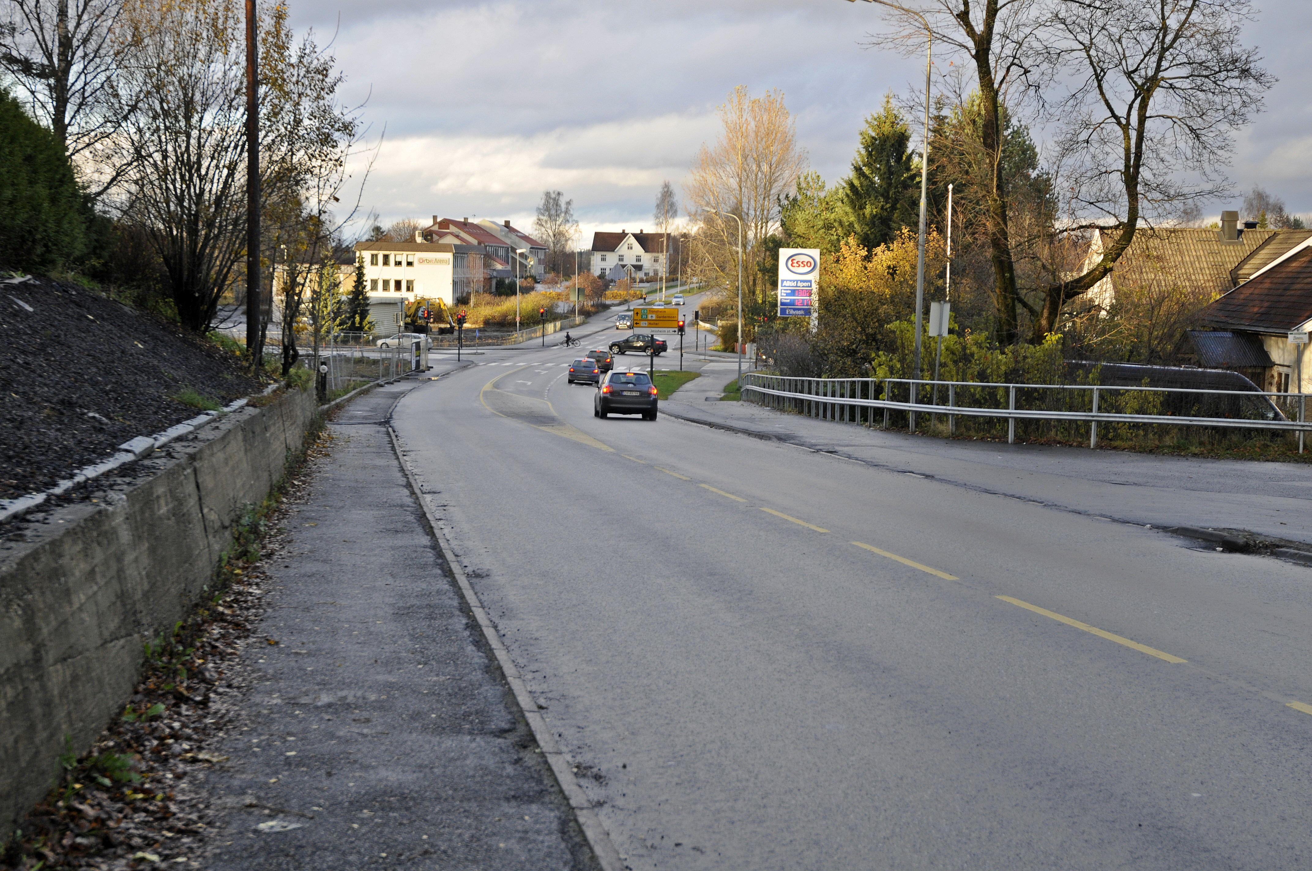 Krysset mellom Fylkesvei 454 og Fylkesvei 459 gjennom Jessheim